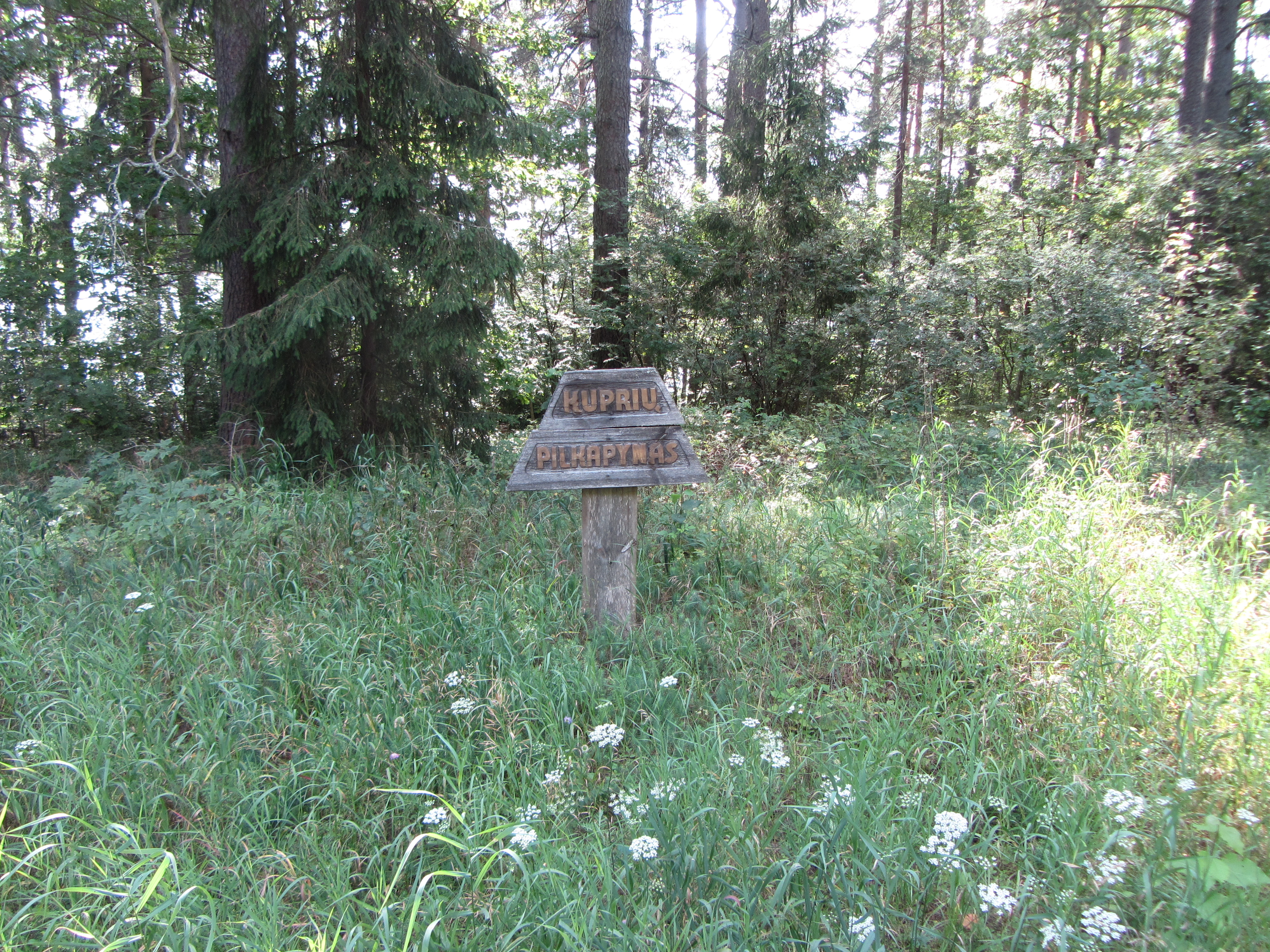 Linkmenų sen., Lithuania